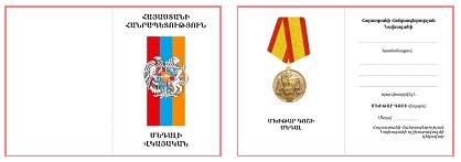 Մխիթար Գոշի մեդալի վկայական